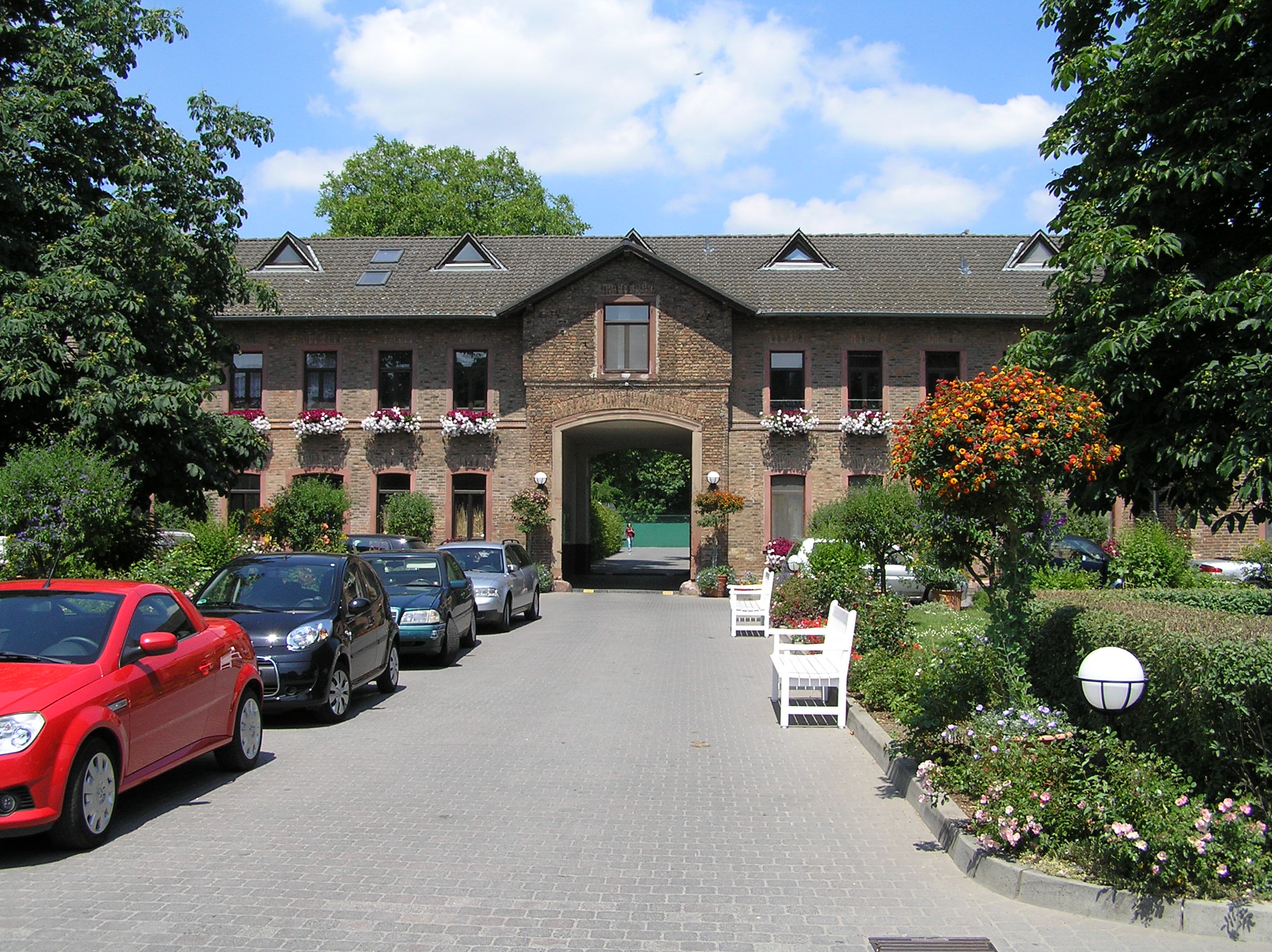 Einfahrt der Domäne Mechthildshausen